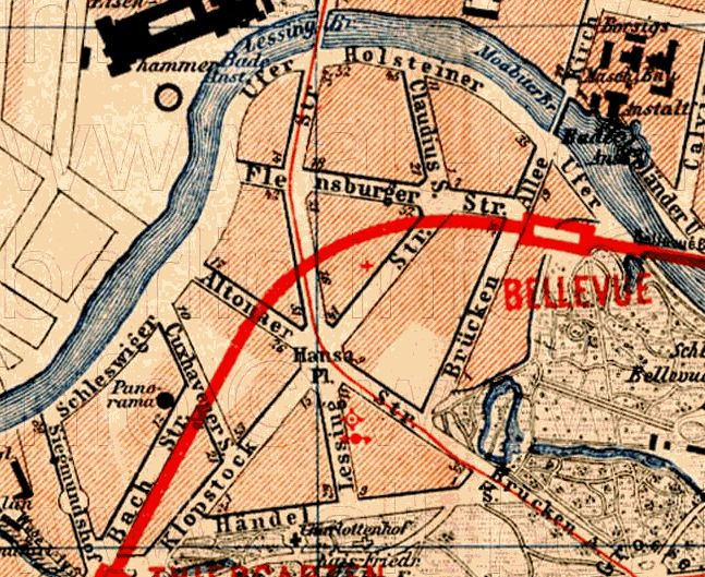 Berlin Hansaviertel in 1893, excerpt from map “Plan von Berlin mit sämtlichen Vororten und vollständiger Stadt- und Ringbahn”, Berlin: Straube, 1893